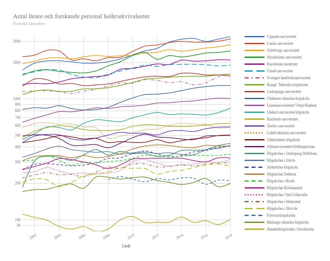 Antal anställda lärare och forskande personal på svenska lärosäten (heltidsekvivalenter) Sveriges 29 största lärosäten. Logaritmisk vertikal skala. Åren 2001 till 2018. Listan är i avtagande ordning efter storleken år 2018. Datakälla: Universitetskanslersämbetets statistikdatabas